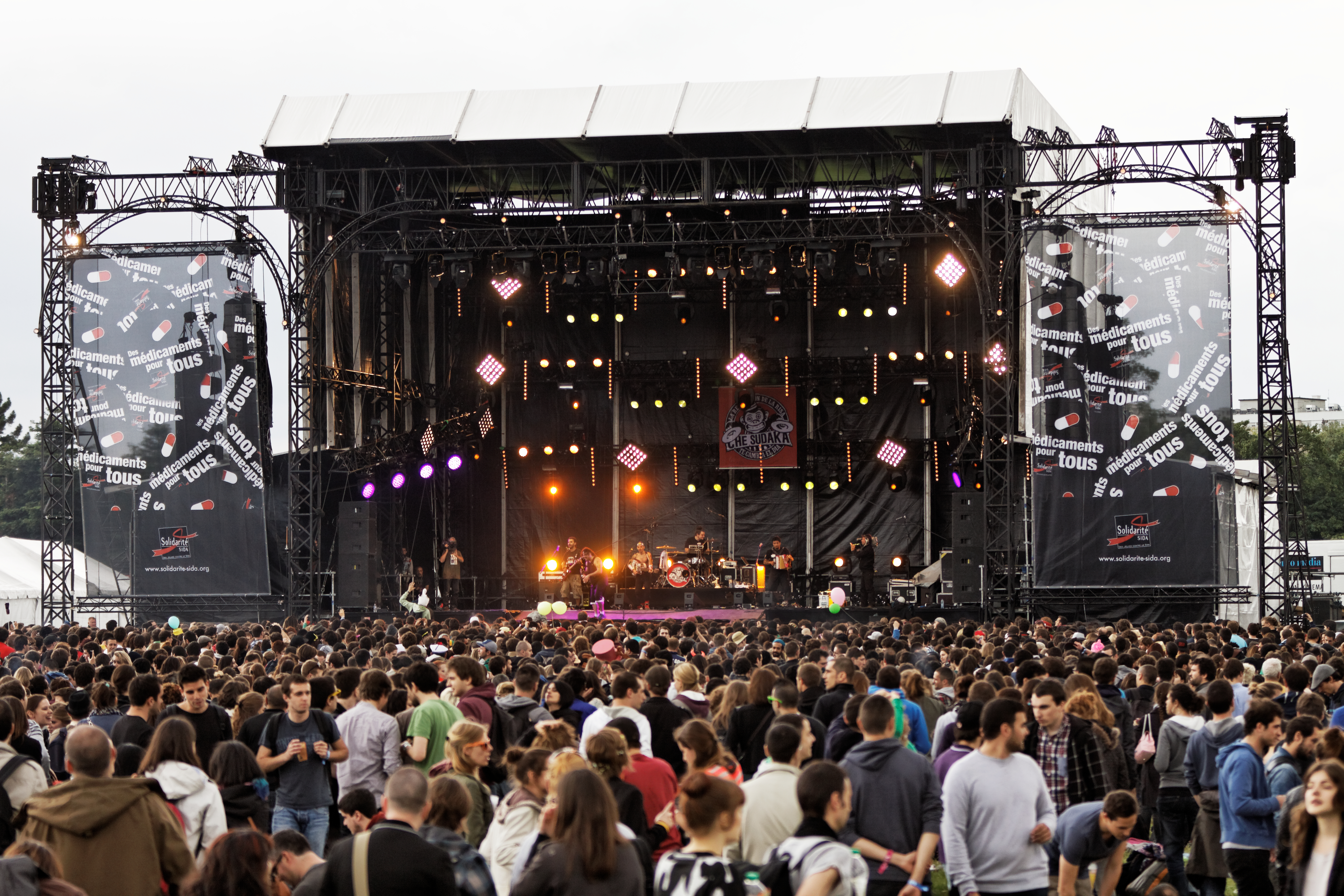 La scène Bagatelle du festival Solidays.